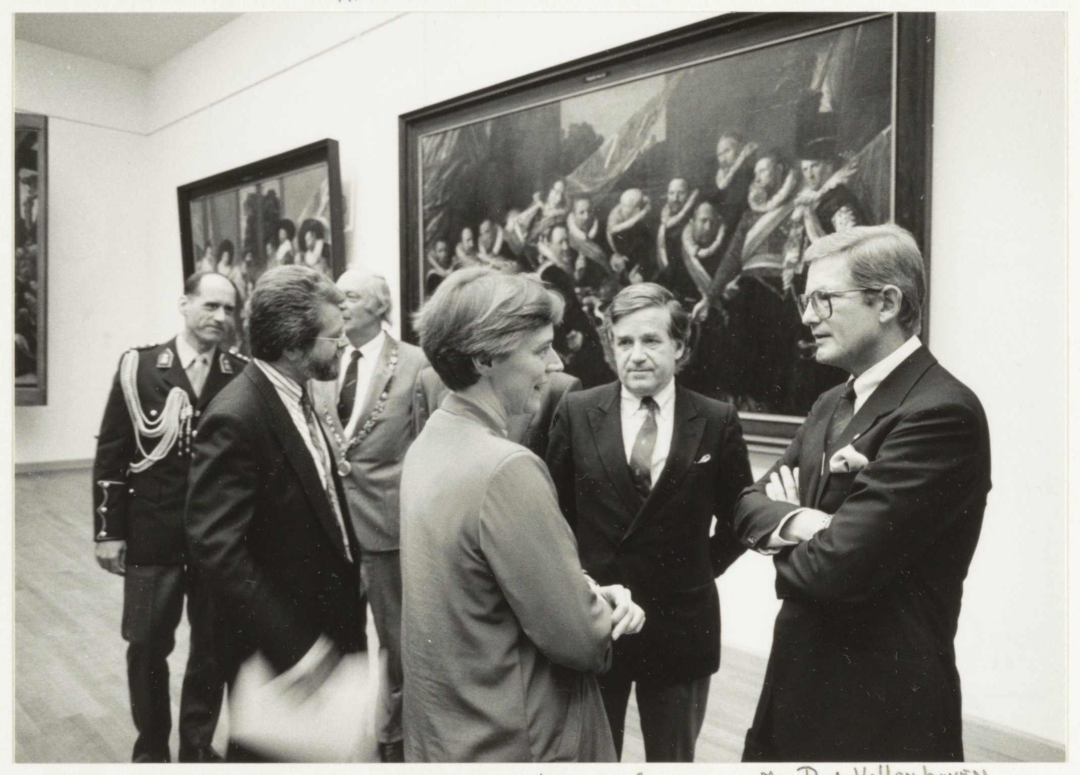 CollectieCollectie Fotoburo de BoerInventarisnummerNL-HlmNHA_54020716NL-HlmNHA_1478_28246KBeschrijvingFrans Halsmuseum, bezoek van Mr. Pieter van Vollenhoven. Midden: Mw. A. van Grevenstein, rechts naast haar museumdirecteur Dick Snoep.FotonummerNL-HlmNHA_1478_3188DocumenttypeTopografische prenten, tekeningen en foto'sVervaardigerBoer, Poppe de Soort vervaardigerFotograaf Interieur/ExterieurInterieurAnnotatiesHD151087PersonenVollenhoven, Prof. mr. Pieter van (geb. 1939) Functies personenKoninklijk huis LandNederland ProvincieNoord-Holland GemeenteHaarlem PlaatsHaarlem StraatGroot Heiligland GeografischCentrum Datering gebeurtenis14-10-1987TechniekFoto TrefwoordenMusea, Koninklijke bezoeken